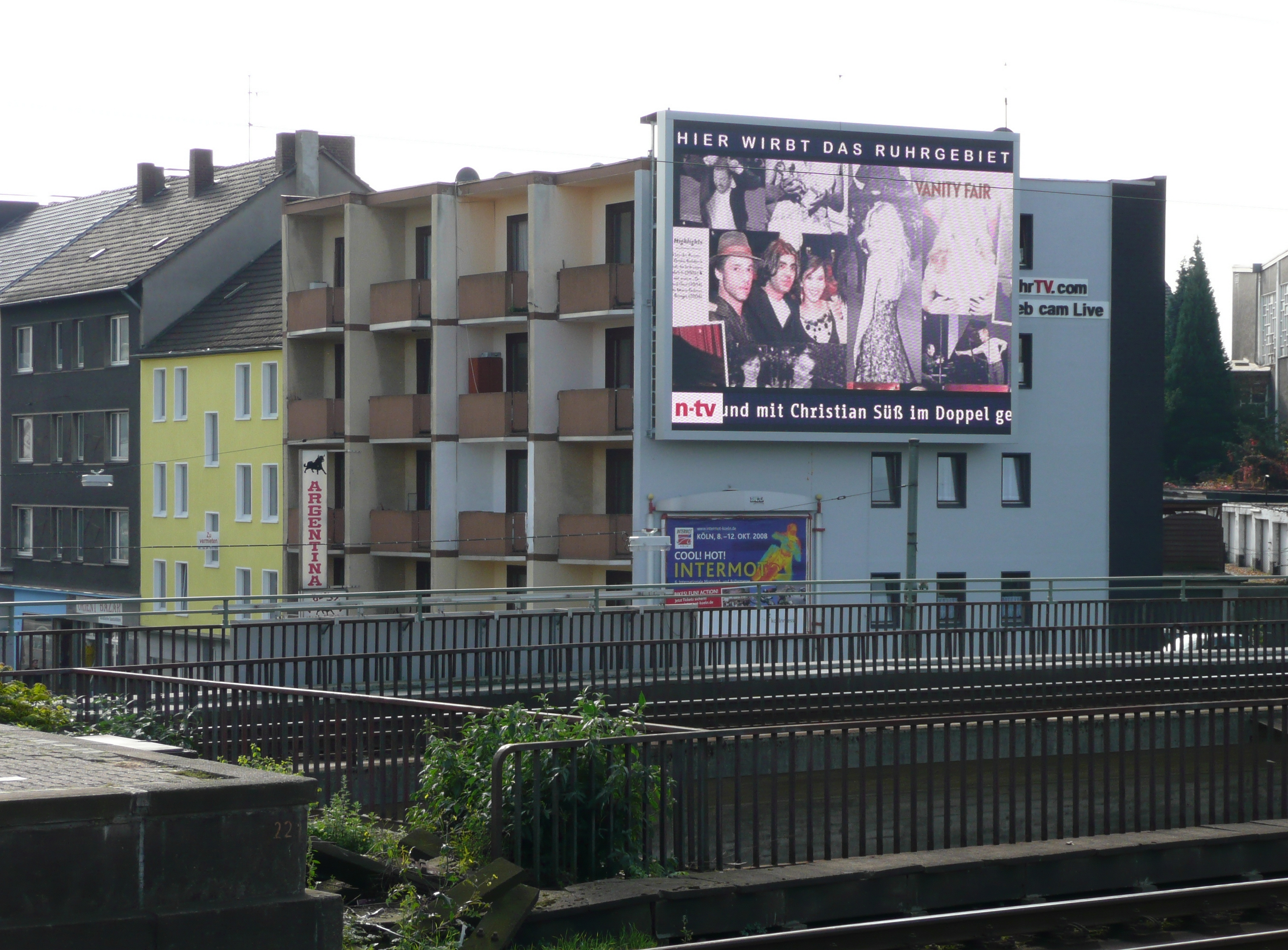 Elektronische Werbe- und Nachrichtentafel